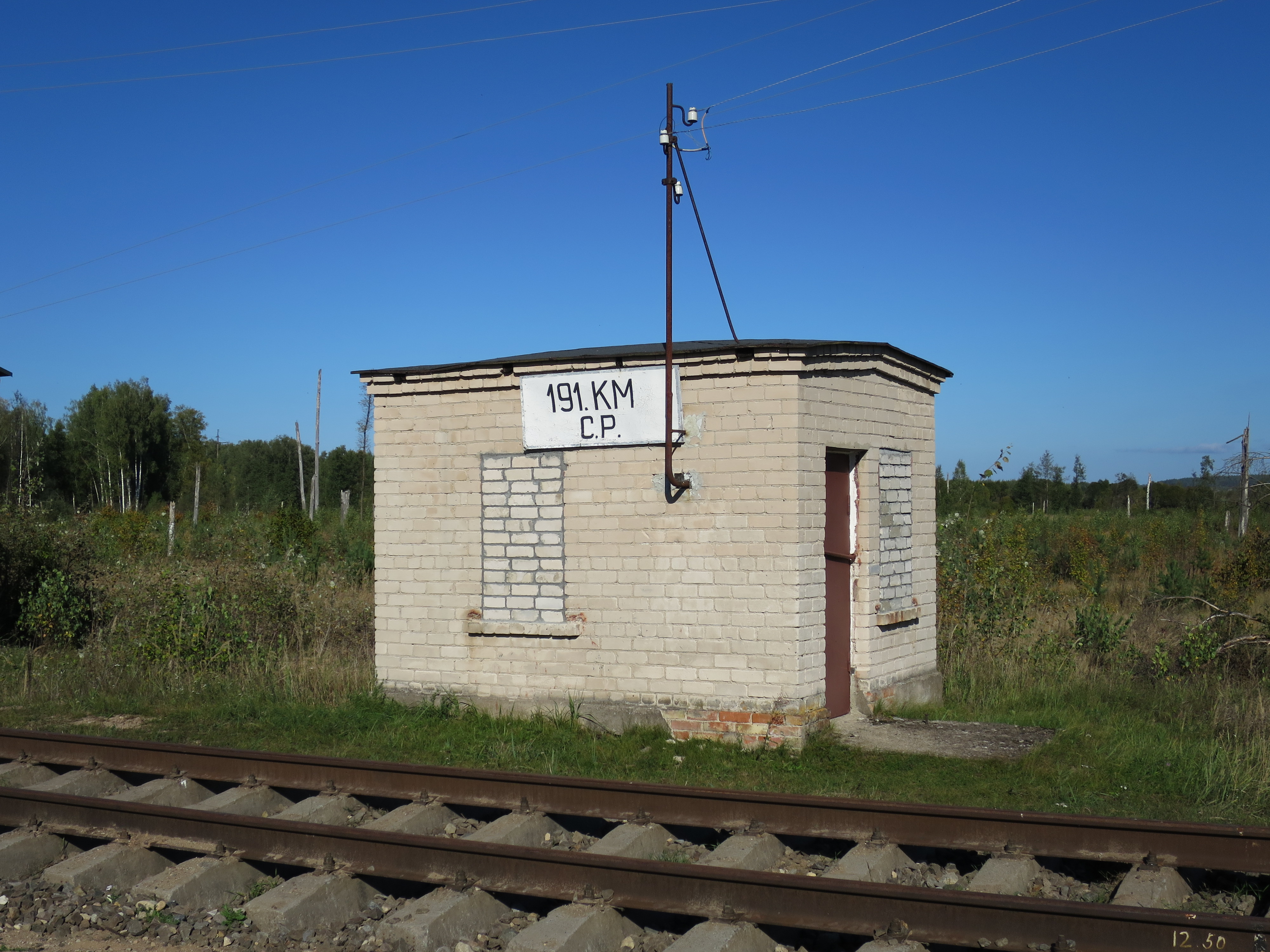 191. kilometra ceļa posteņa ēka.